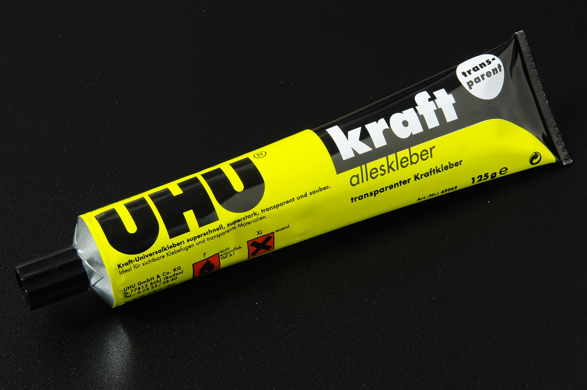 Uhu transparenter Kontaktkleber